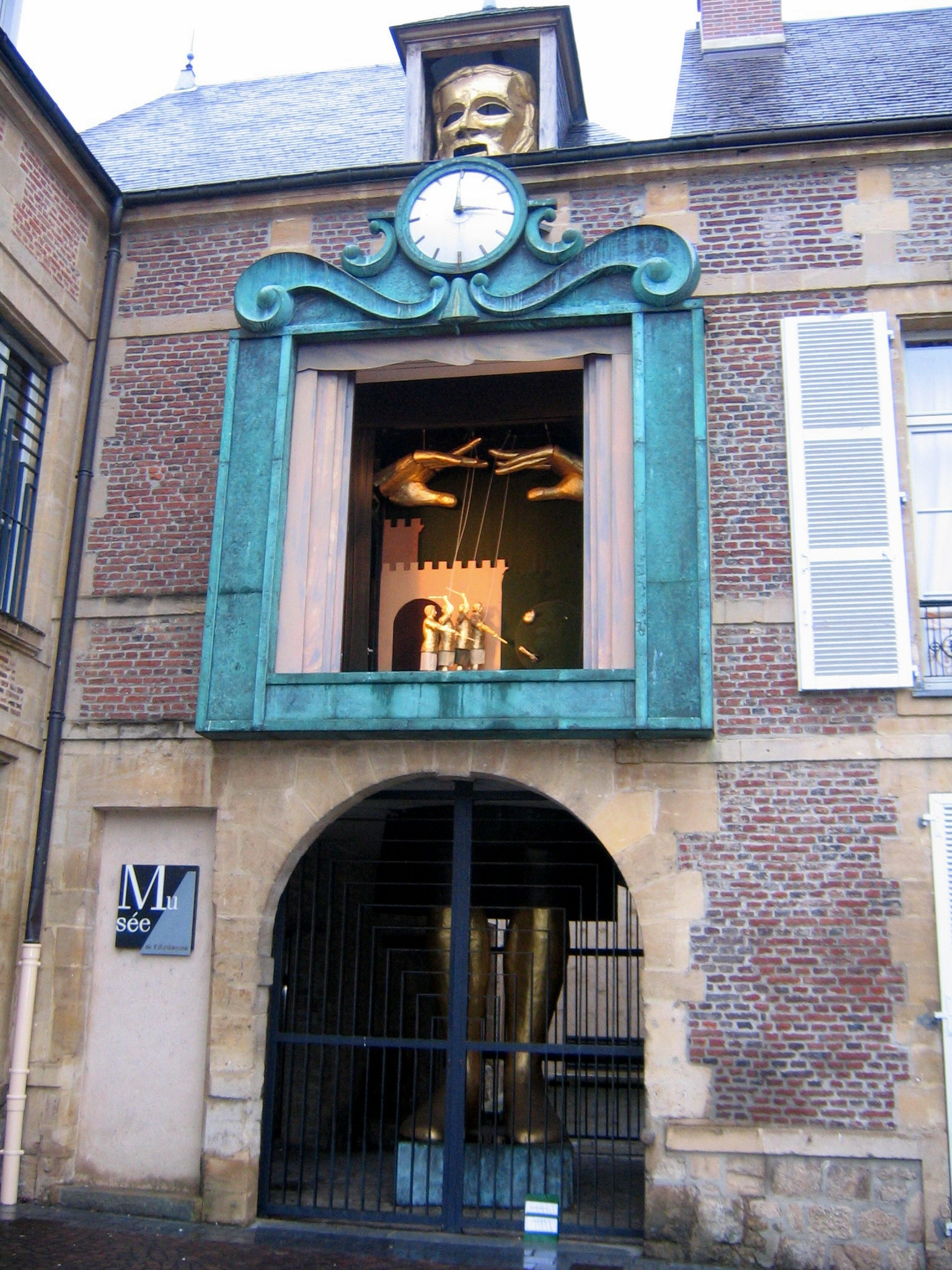 l'horloge contant l'histoire des qautre fils aymond entre le musée et l'école des marionettes.